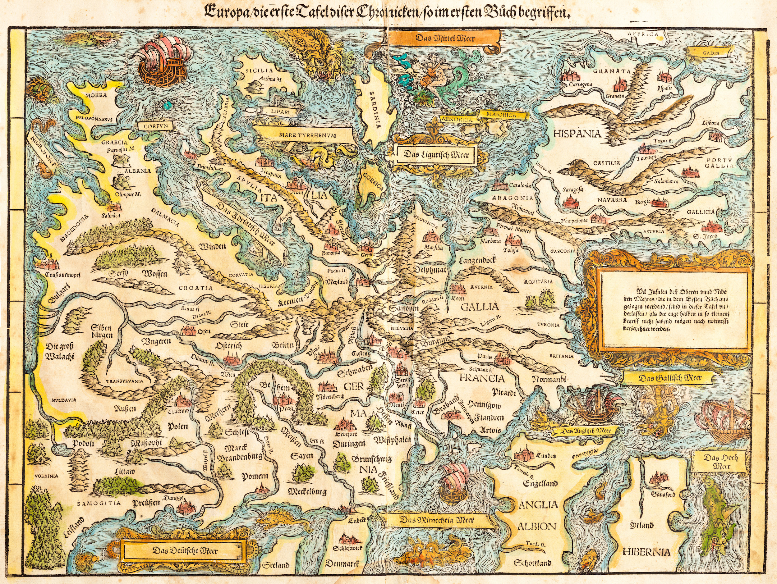 Europa/die erste, Tafel des Ersten Buchs, Johannes Stumpf (Zürich, 1548-50) Карта Європи Йоганна Стампфа видання 1548 р. є художньою версією карти «Космографія» Себастьяна Мюнстера (ключова робота періоду «нової географії», що прийшов на зміну географії Птолемея). Саме з праць Мюнстера і Стампфа у європейський обіг географічних назв входять назви Волинь [Volhinia] щодо Центральної України та Русь [Russia] щодо Західної.